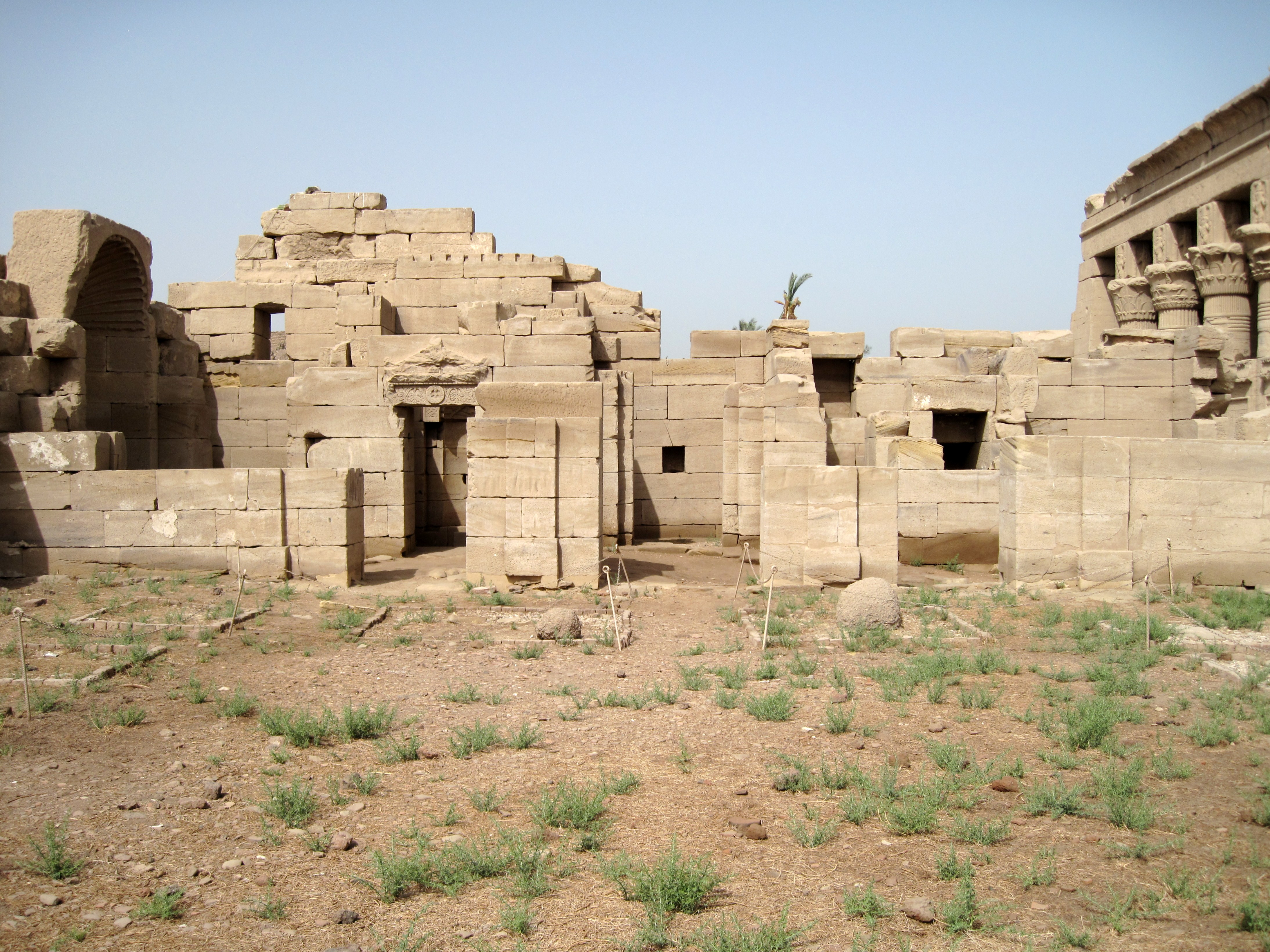 Ehemalige christliche Basilika (koptische Kirche) im Tempelkomplex von Dendera, Ägypten